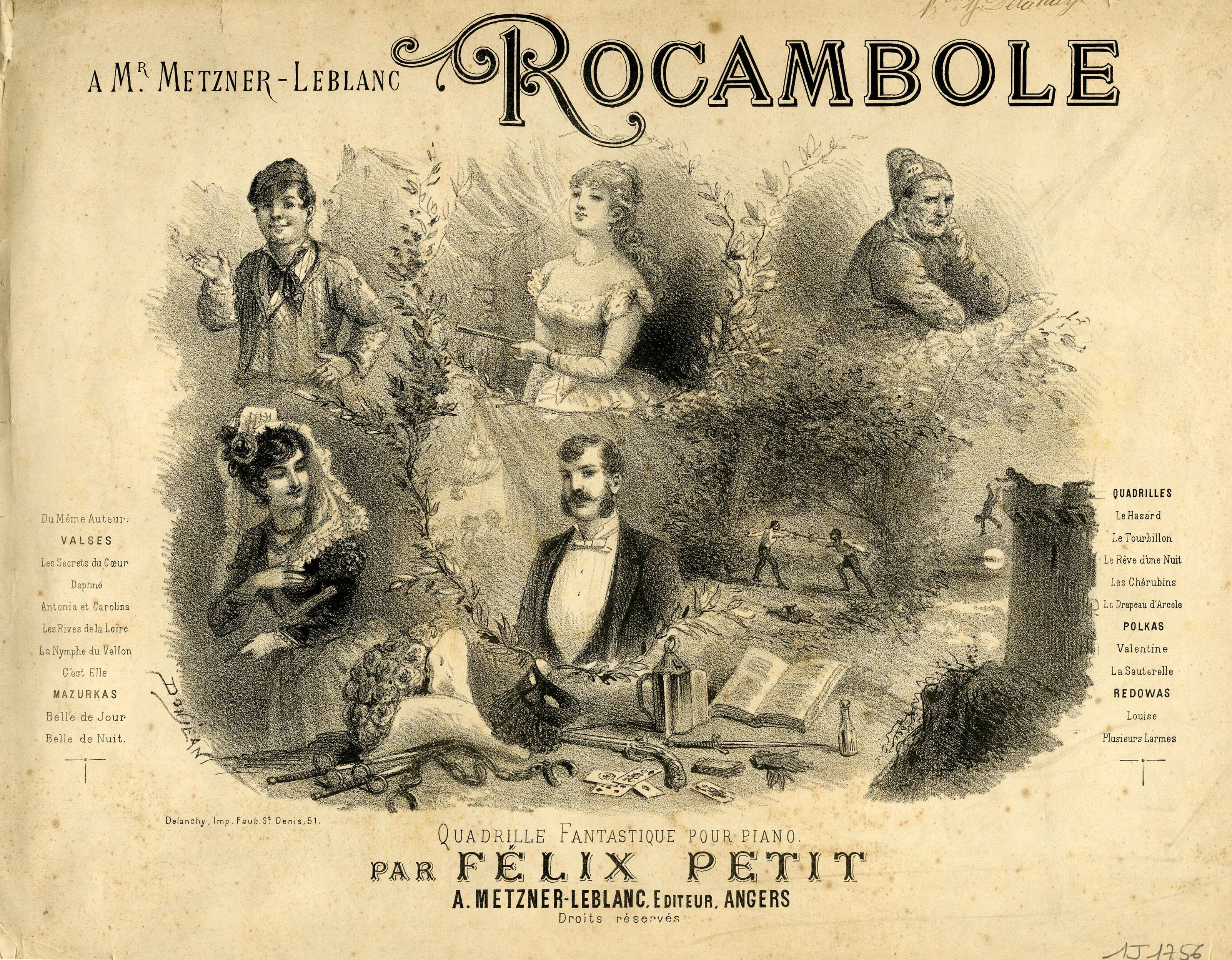 Page de couverture de Rocambole, Quadrille fantastique pour piano, de Félix Petit (1917-1914)